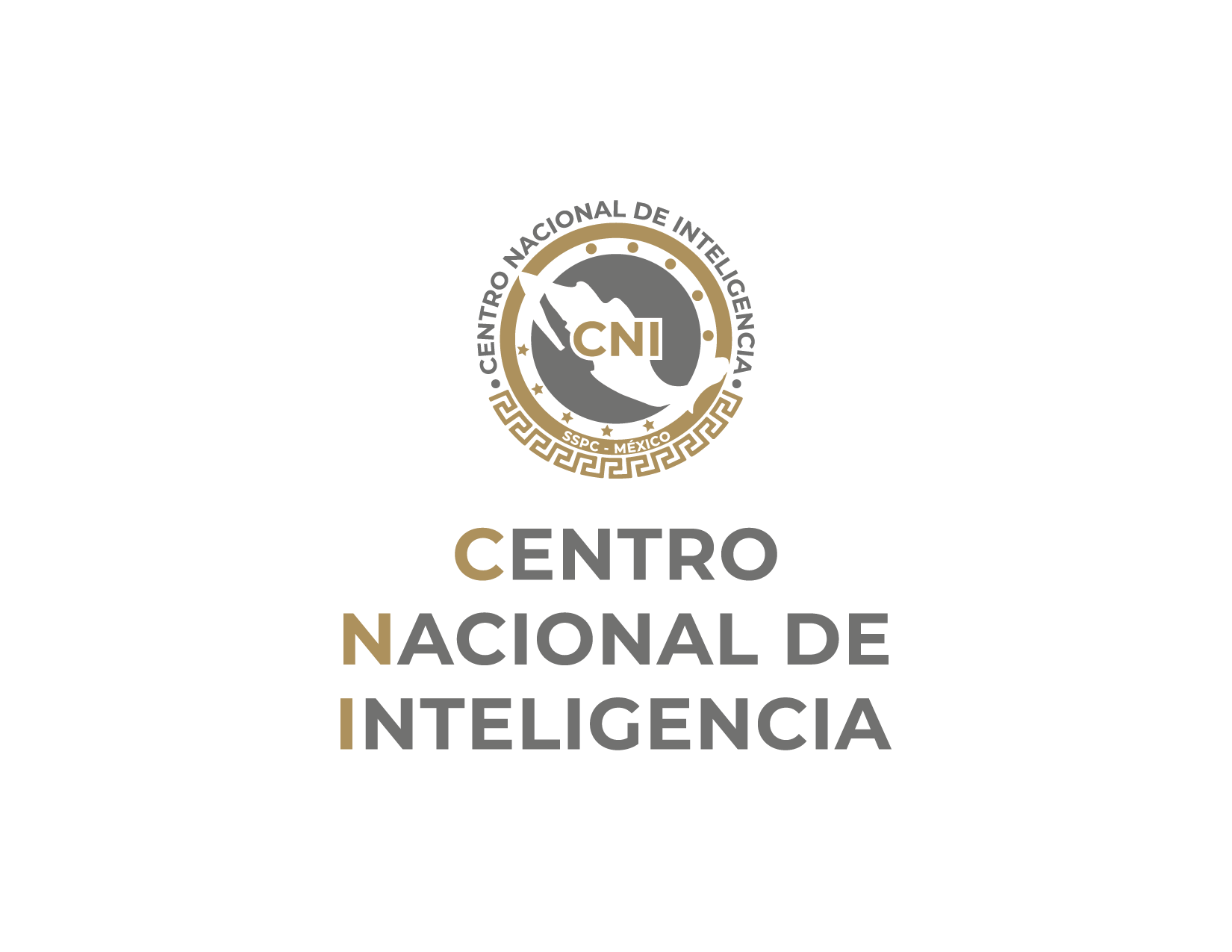 Logo del Centro Nacional de Inteligencia